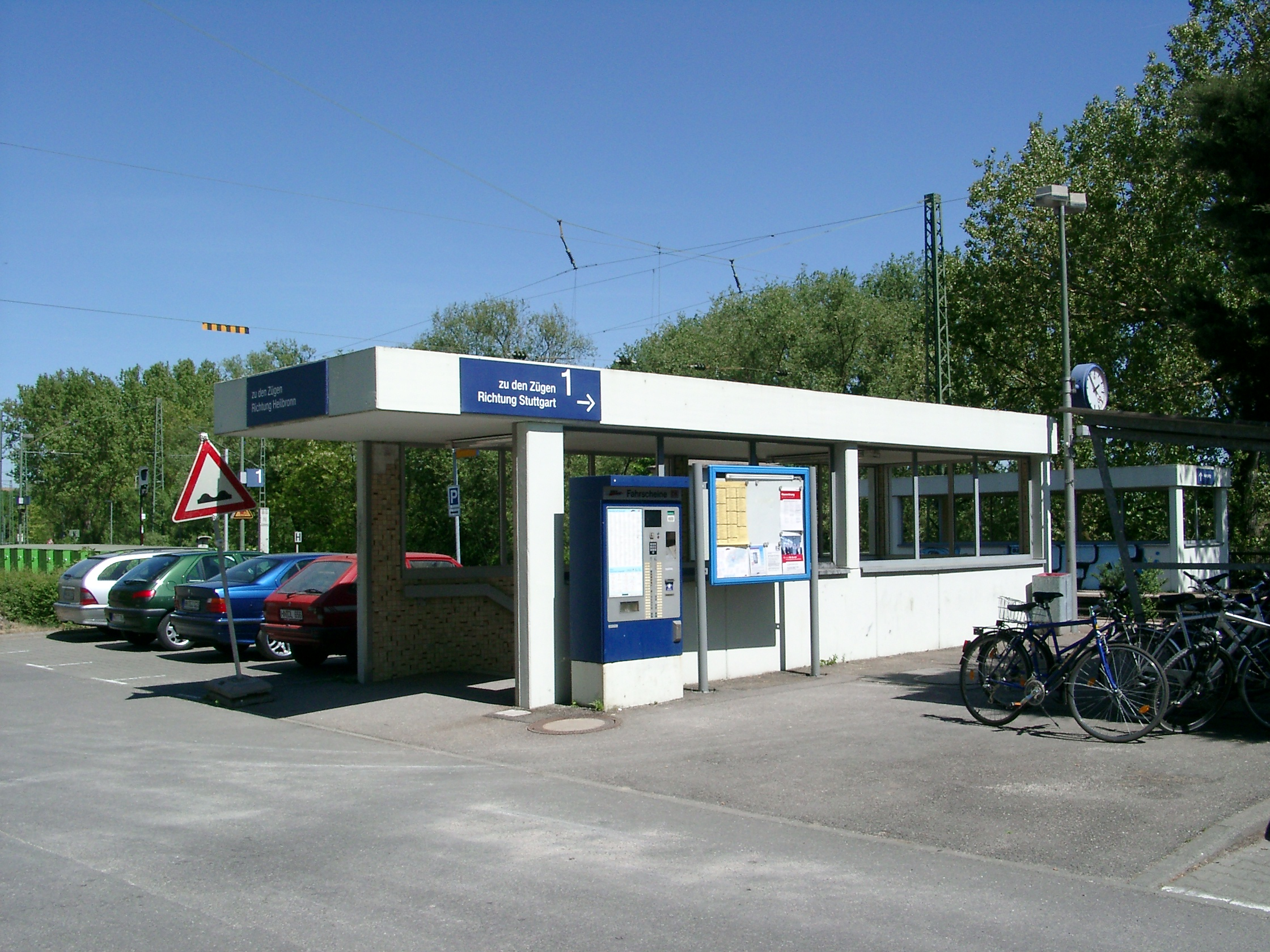 Nordheim, Bahnhof